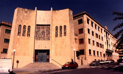 Fotografia del Sagrat Cor de Jesús de Tarragona